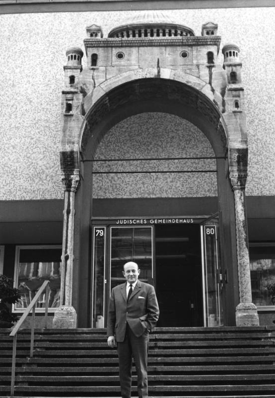 20.1.1967 Berlin/West Heinz Galinski vor dem jüdischen Gemeindehaus in der Fasanenstr.